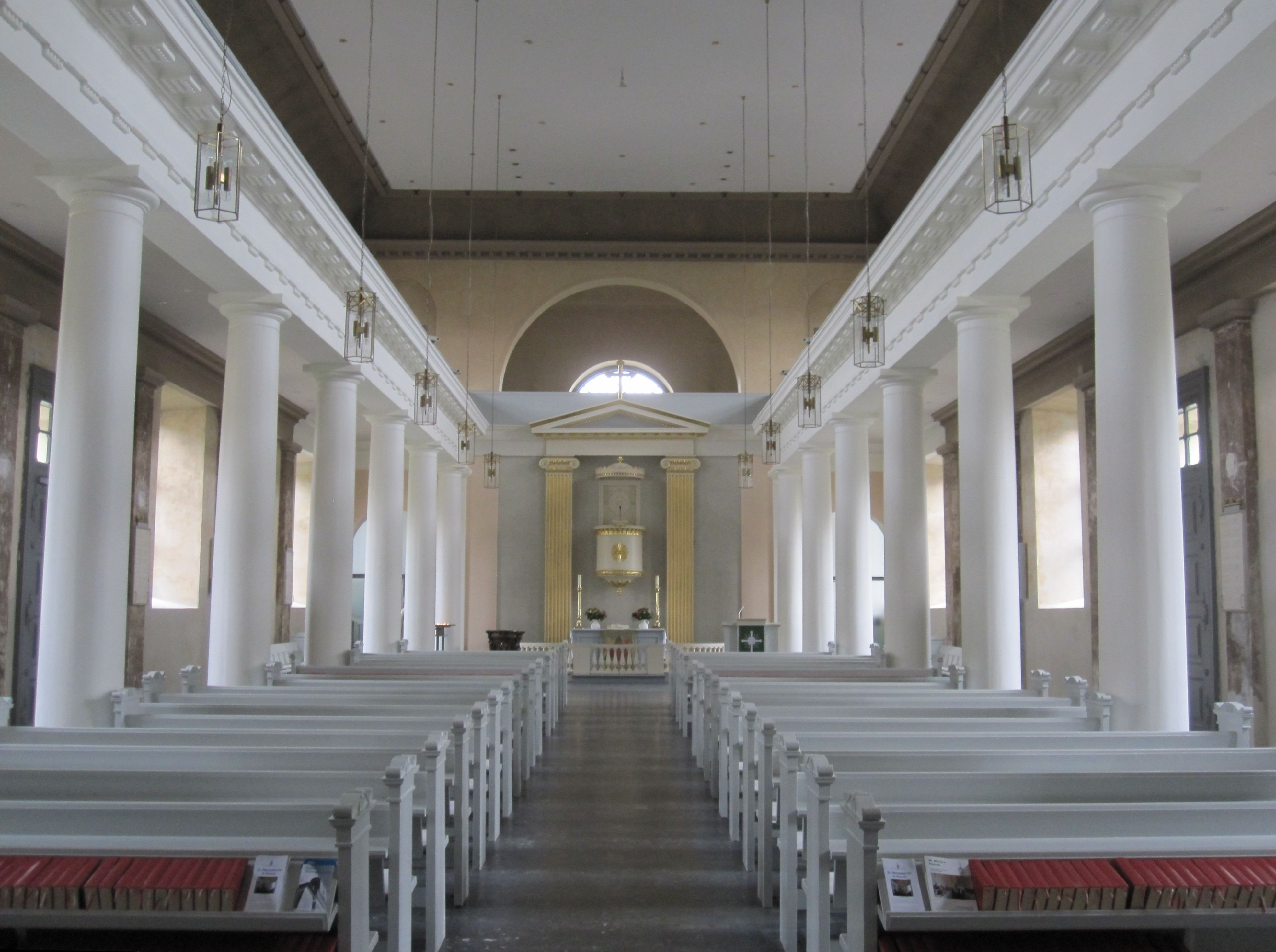 Das Innere der Kirche wurde gegenüber der Zeit der Errichtung 1829 bis 1833 durch Christian Friedrich Hansen, der als Hauptbaumeister des nordischen Klassizismus’ bezeichnet wird, verändert. (Dietrich Ellger in Heinz Rudolf Rosemann (Hrsg.): Niedersachsen, Hansestädte, Schleswig-Holstein, Baudenkmäler. Reclams Kunstführer, Deutschland, Band 5, 4. Auflage, Stuttgart 1971, S. 332) Aussehen im Jahr 2013.